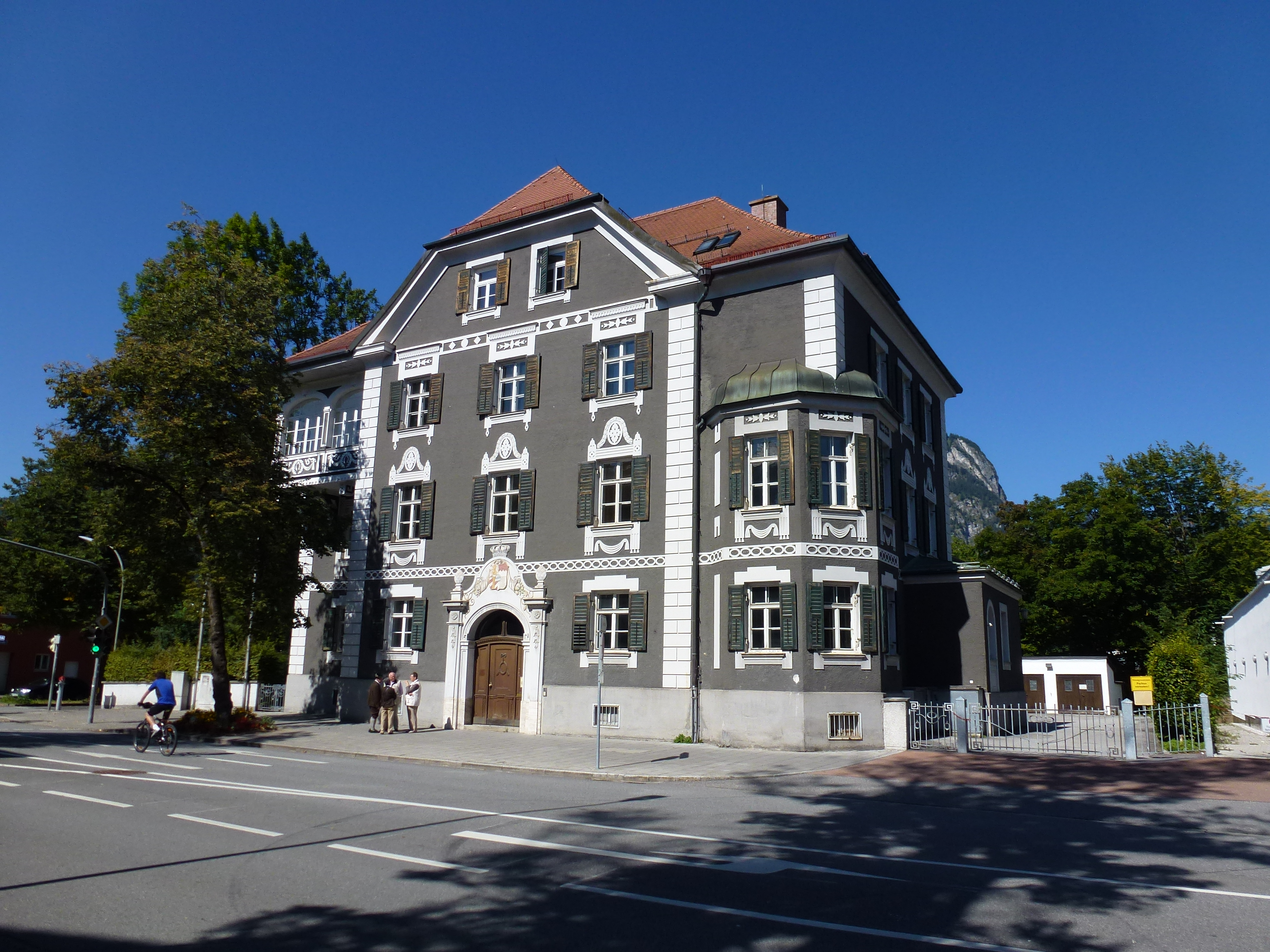 Ehemaliges Finanzamt - Von-Brug-Straße 5, Garmisch-Partenkirchen